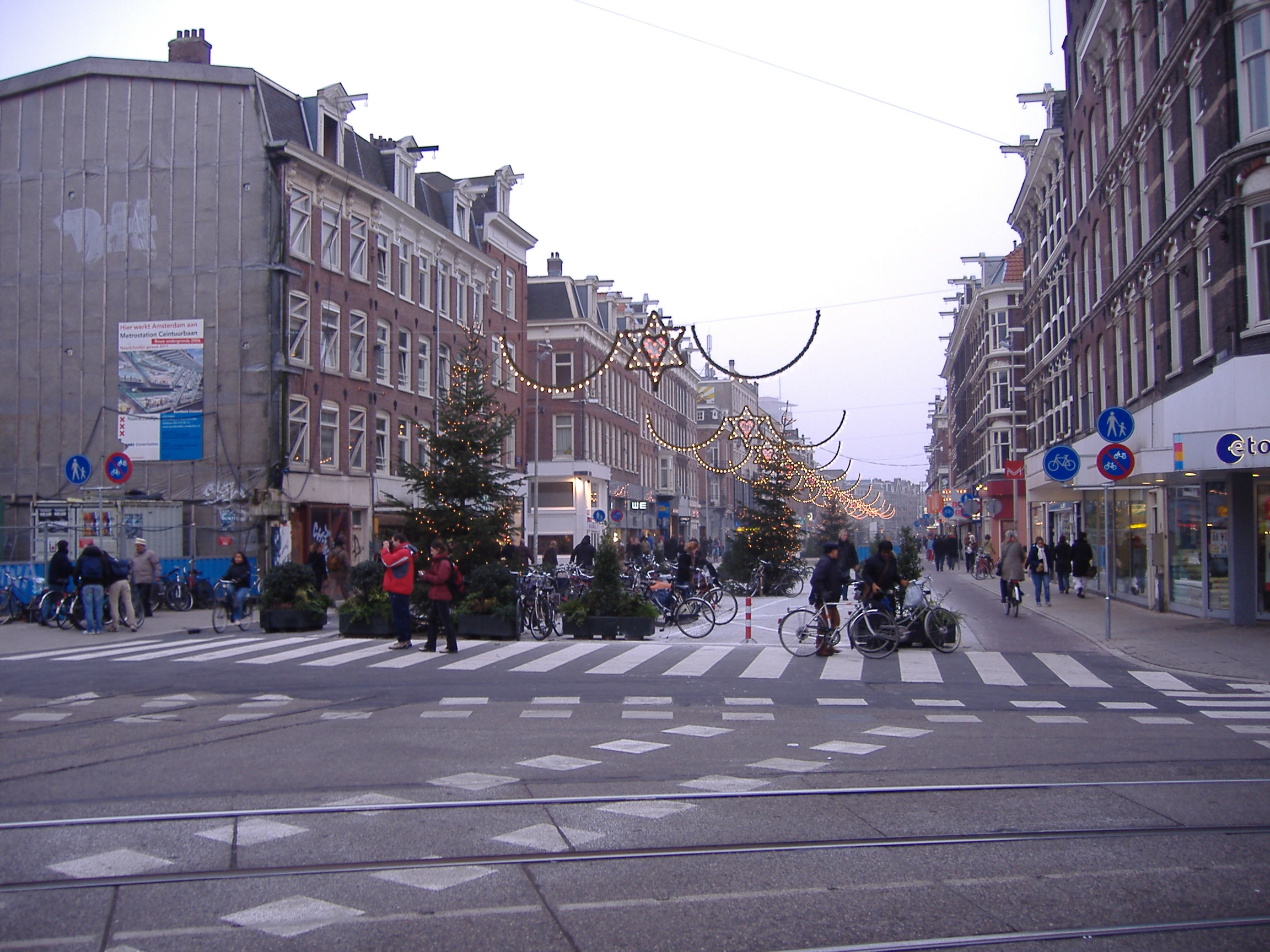 eigen opname, 27 december 2006